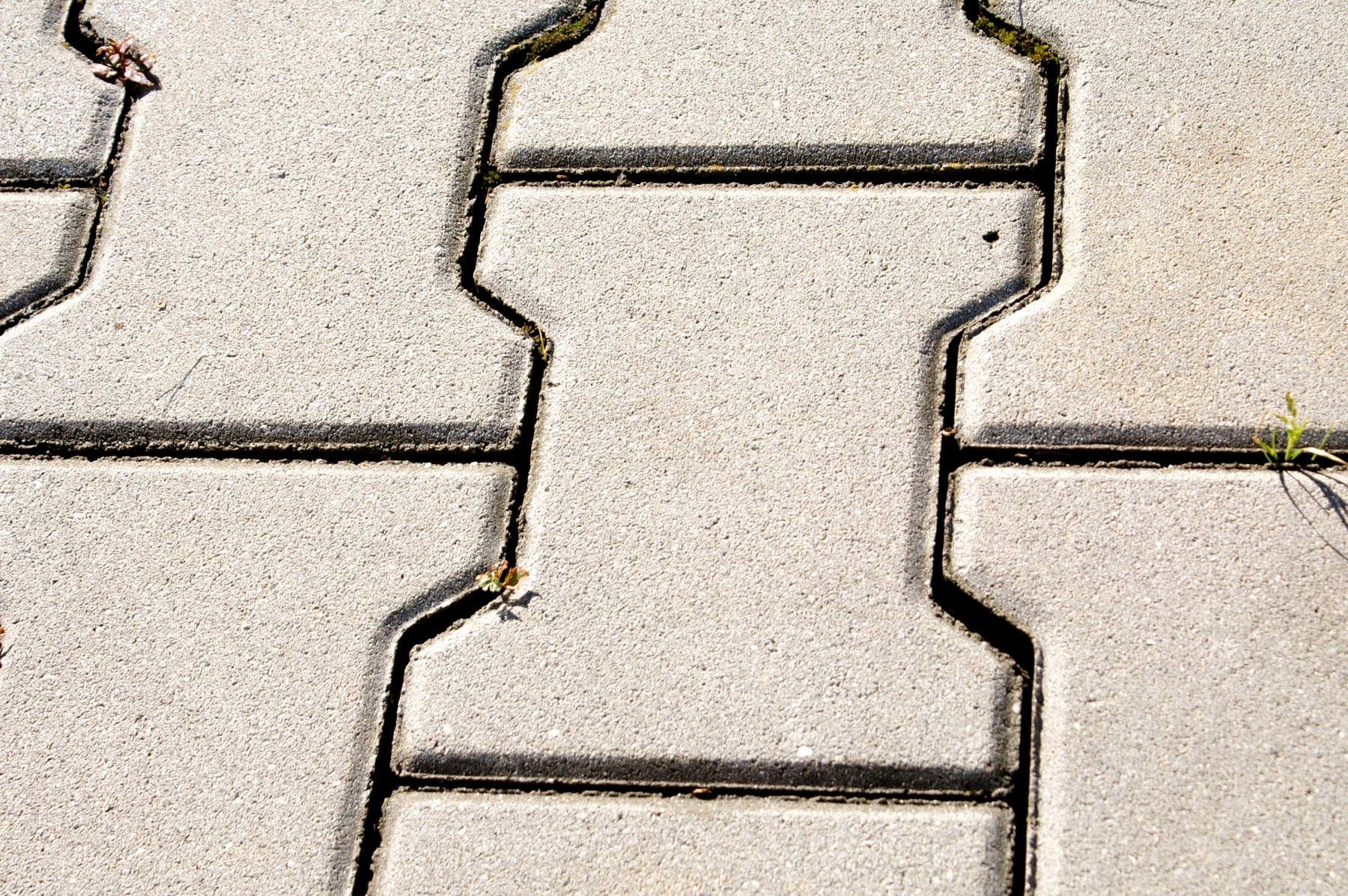 Paver block